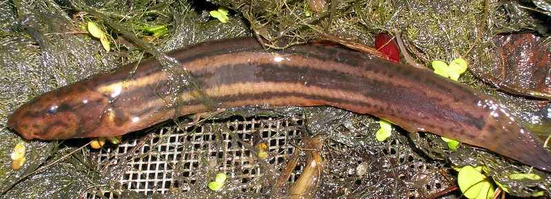 Grote Modderkruiper